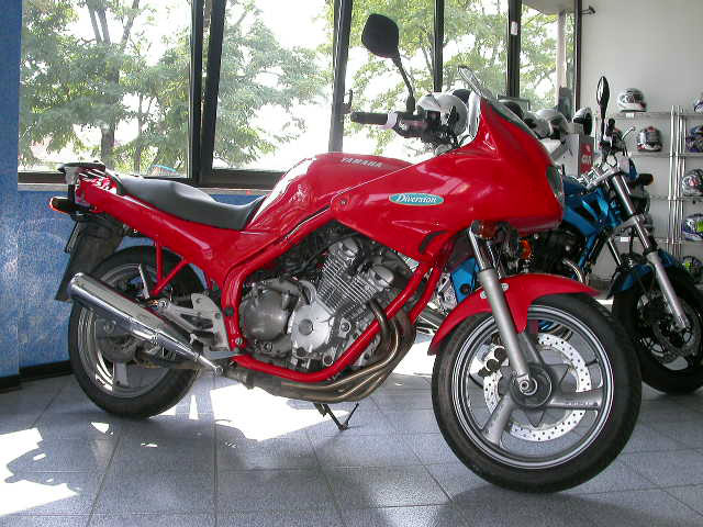 Yamaha XJ 600 S Diversion prima serie, annata 1993